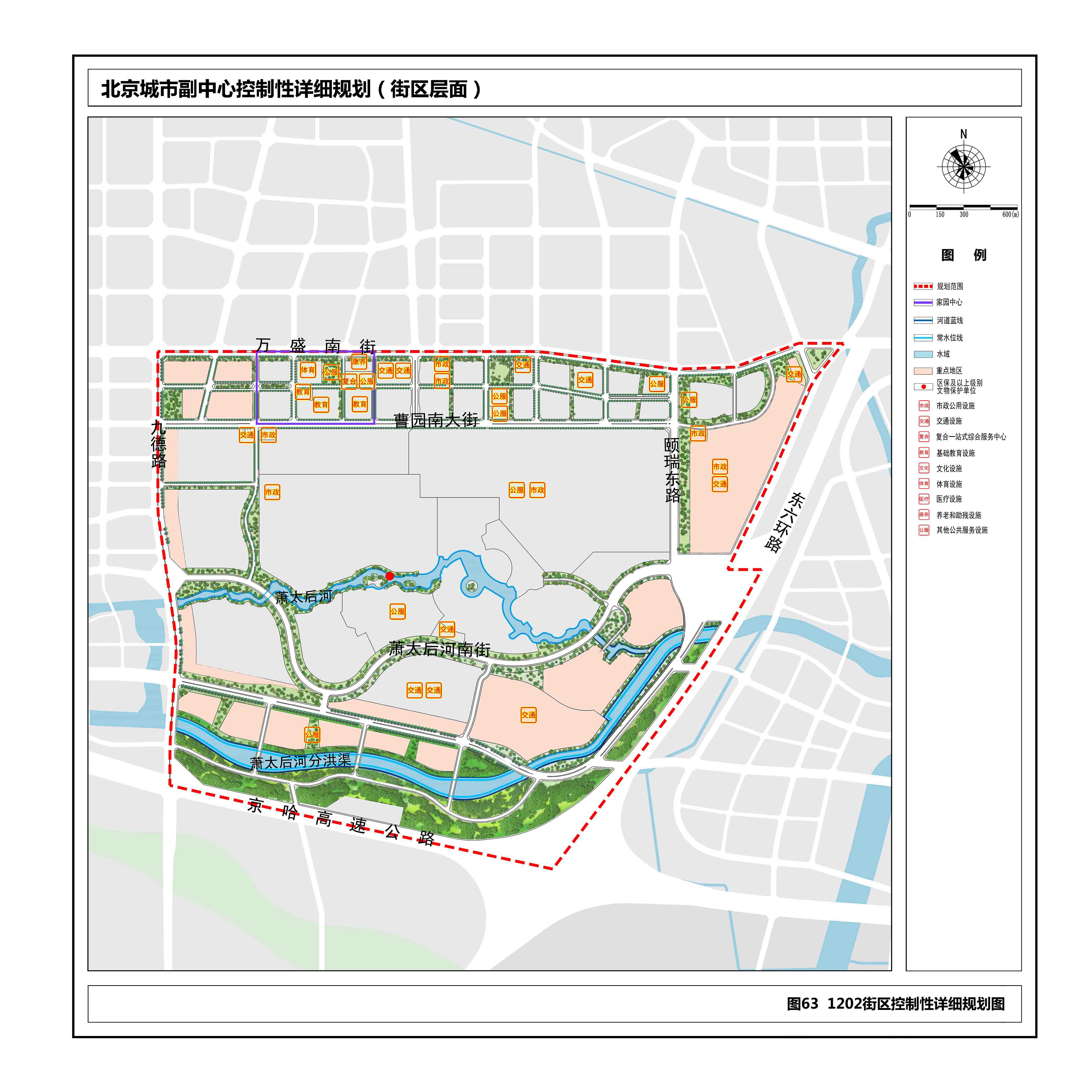 中文（中国大陆）: 北京城市副中心控制性详细规划（街区层面）（2016年-2035年）